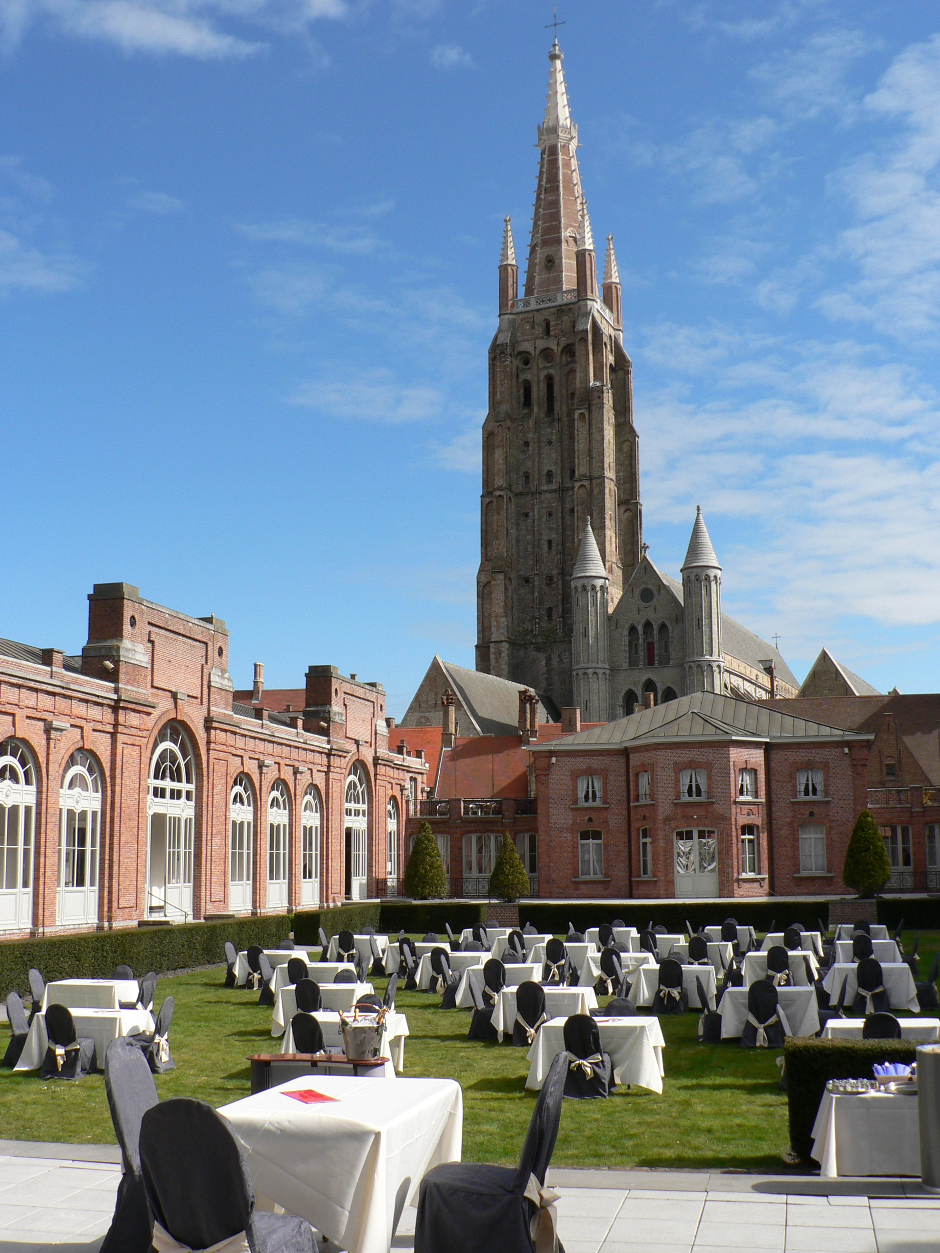 garde Sint-Jans-hospitaal